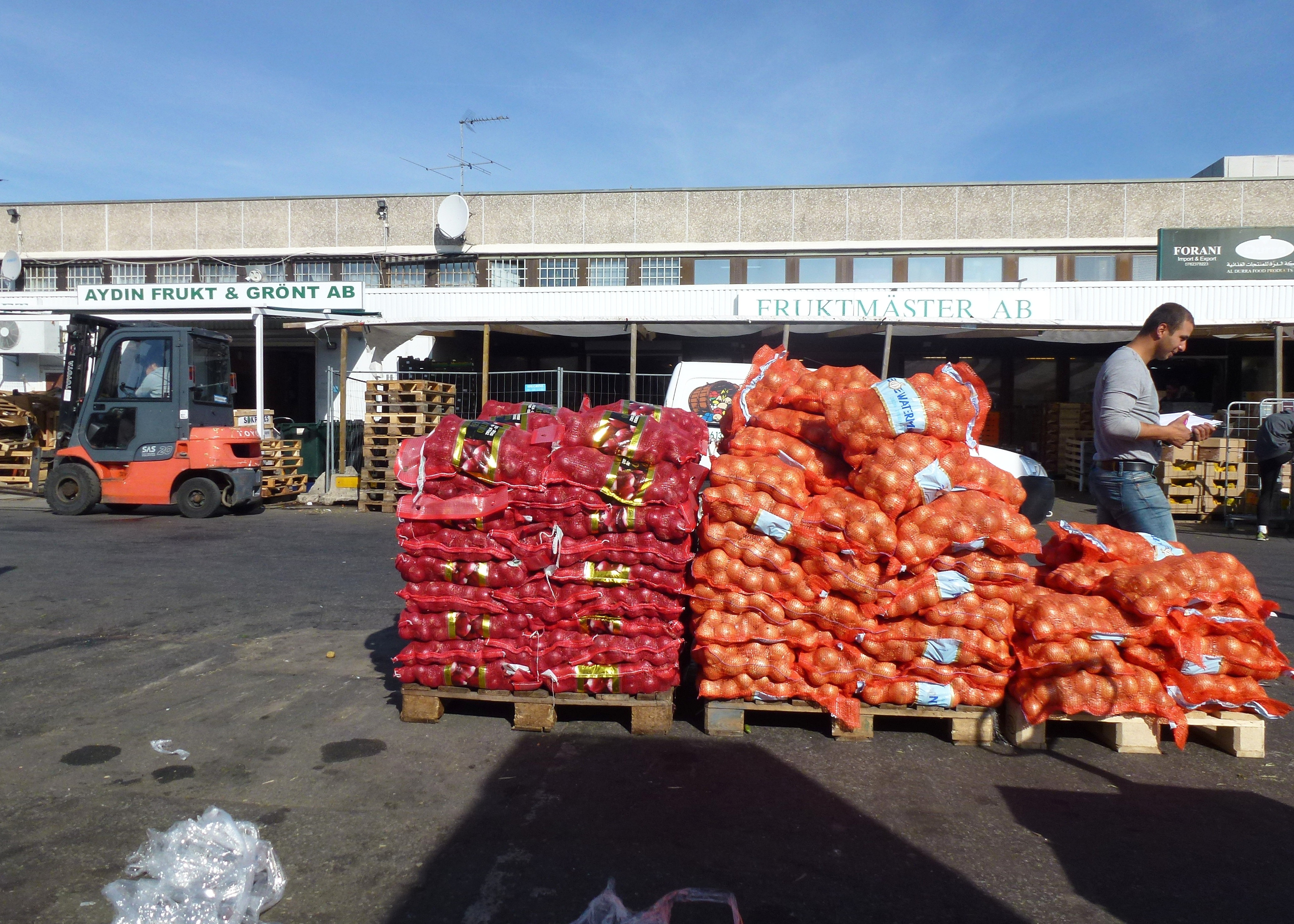 Partihallarna försäljning av frukt och grönt